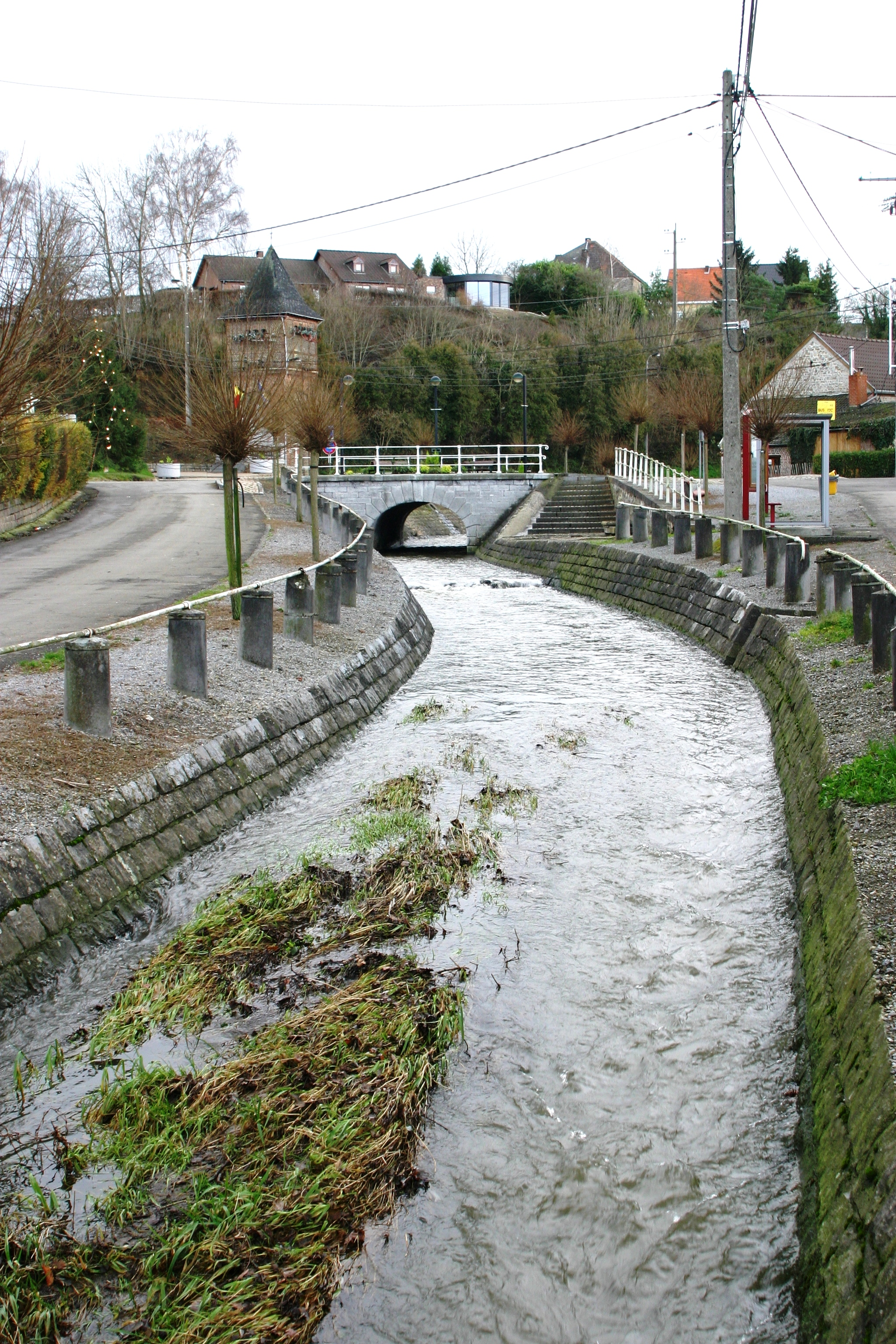 De Ruisseau d'Asse zu Mortroux.